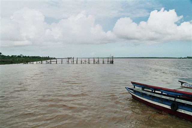 Eigen foto